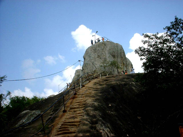 Aradhana Gala, where the Arahant Mahinda landed